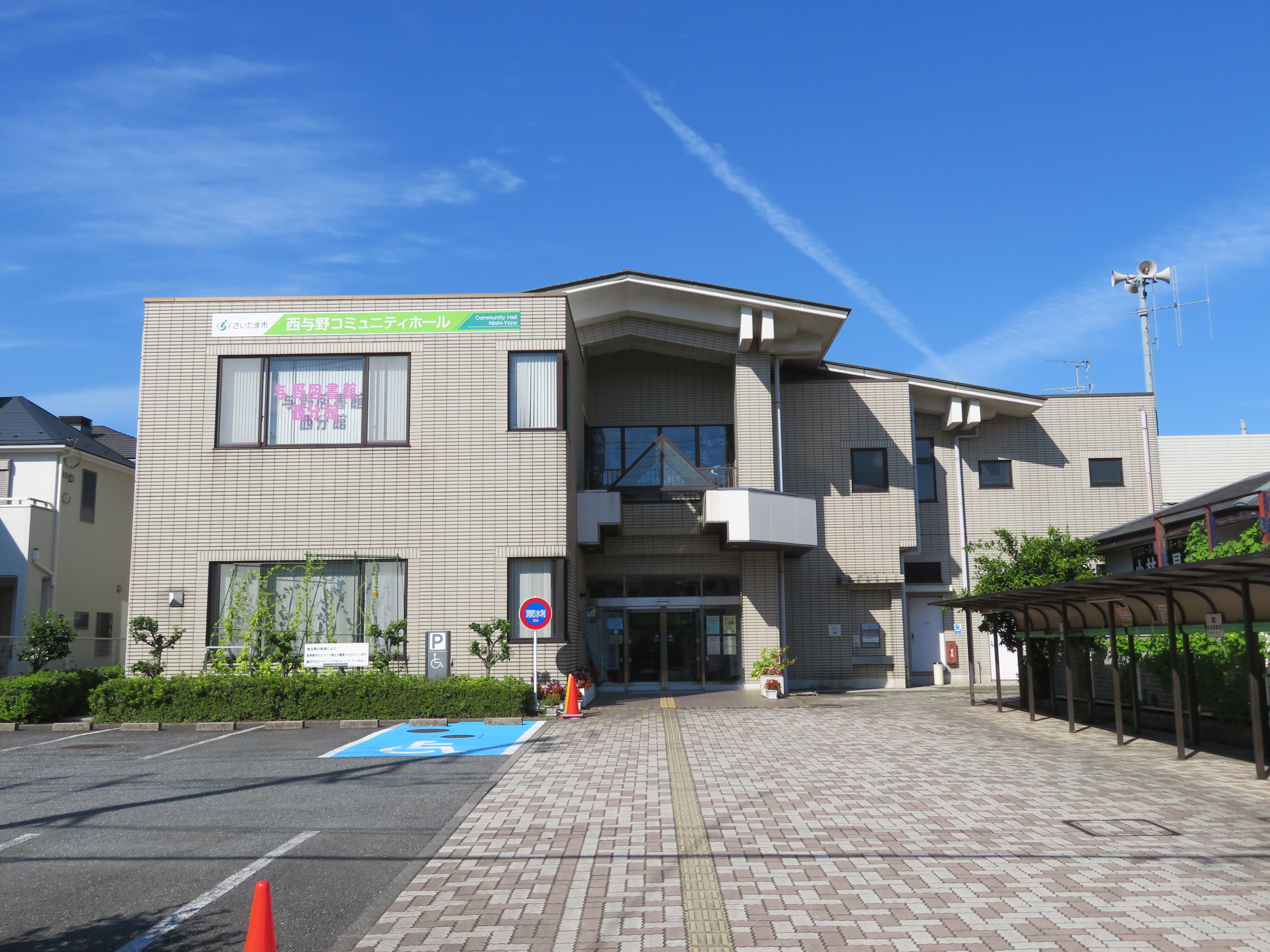 さいたま市西与野コミュニティーセンター建物 Canon PowerShot SX720 HS